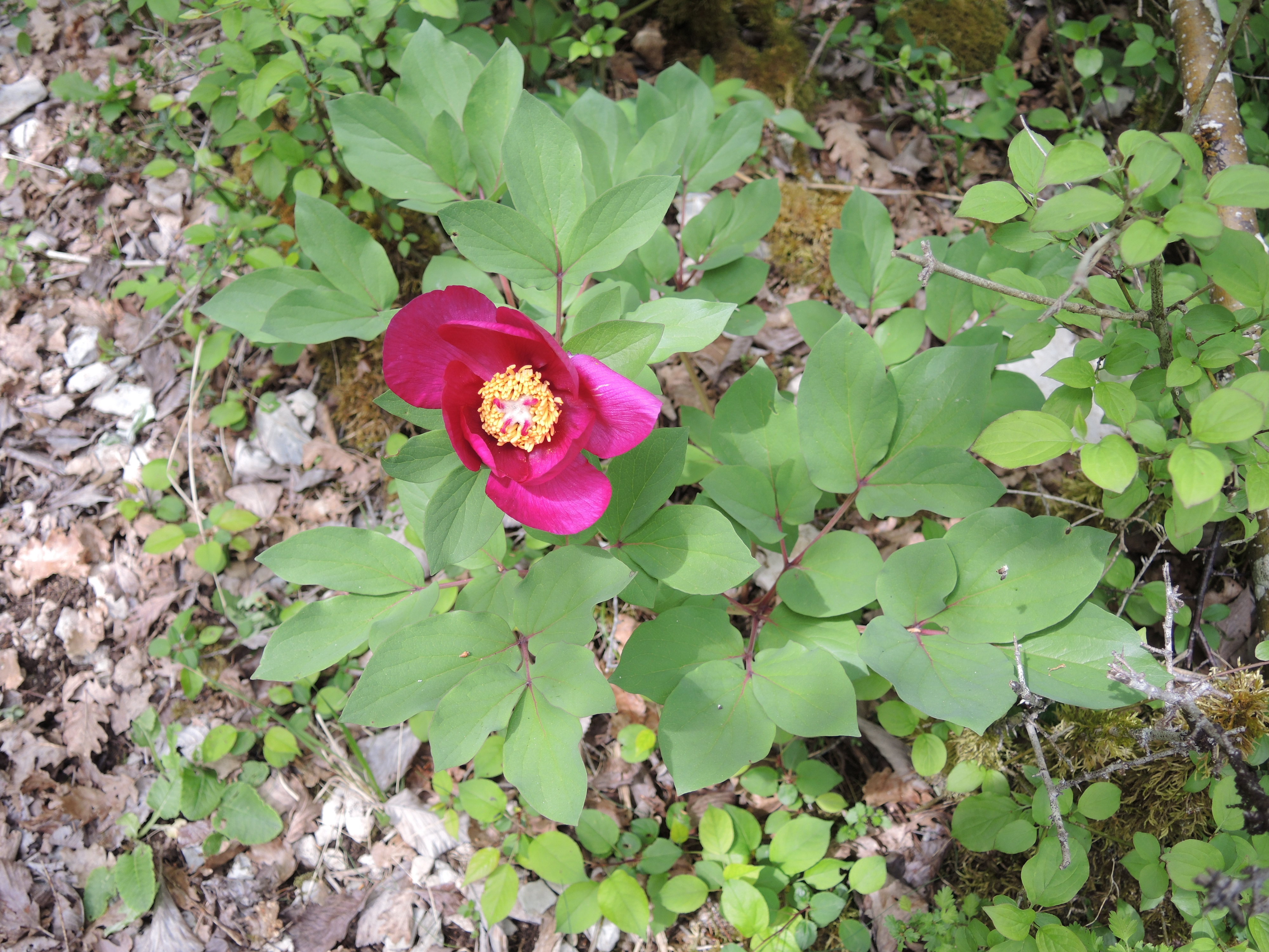 Elément rare de la flore de Côte d'Or.